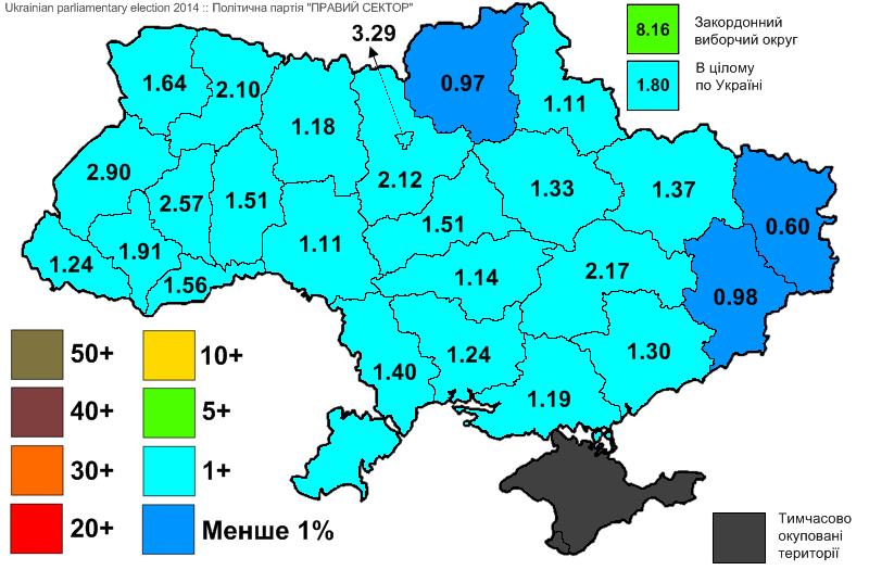 Результати виборів до Верховної Ради України, які відбулись 25 жовтня 2014 року. Інформація з офіційного сайту ЦВК. Політична партія "ПРАВИЙ СЕКТОР".